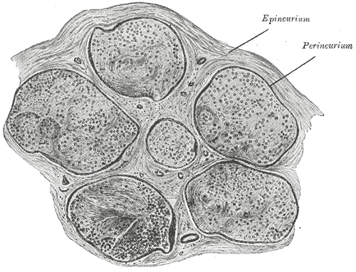 Nervio tibial, en corte transversal. Se indican: Epineuro y Perineuro las dos capas mas externas de los nervios. Epineuro es un tejido fibroso denso y ricamente vascularizado, que mantiene juntos los fascículos nerviosos individuales. En su espesor se encuentran los vasa nervorum. Perineuro está constituído por capas con estructura de láminas superpuestas, de células perineurales y cantidades variables de tejido conjuntivo. Fascículos nerviosos conductores de estímulos (1 en centro y 5 en periferia) que conforman este tronco nervioso en particular. Dibujo semi esquematico.